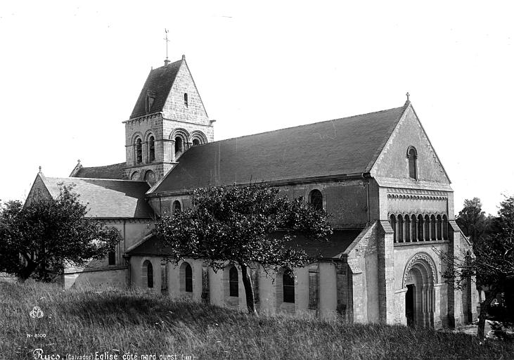 Côté nord-ouest de l'église de Ryes par Séraphin-Médéric Mieusement.